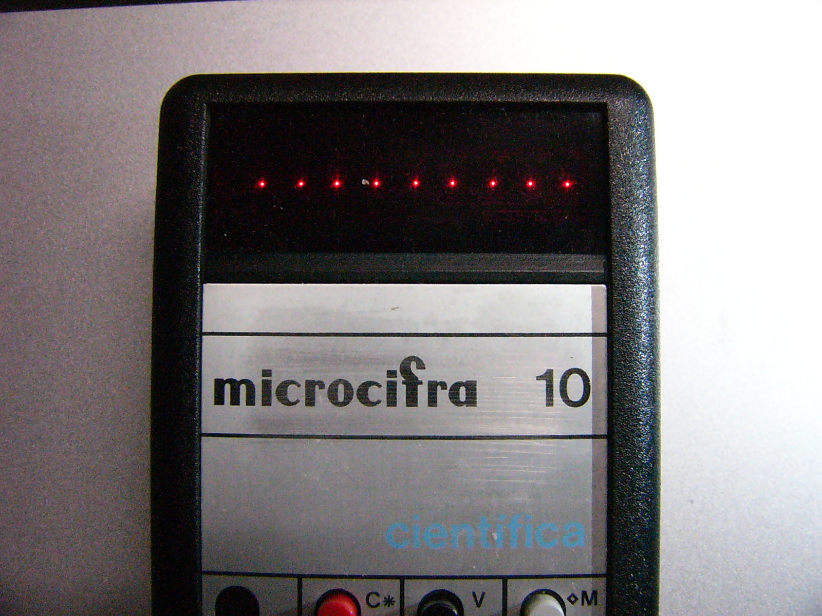 Fate社製 RPN関数電卓 microcifra 10 cientifica (省電力モード)